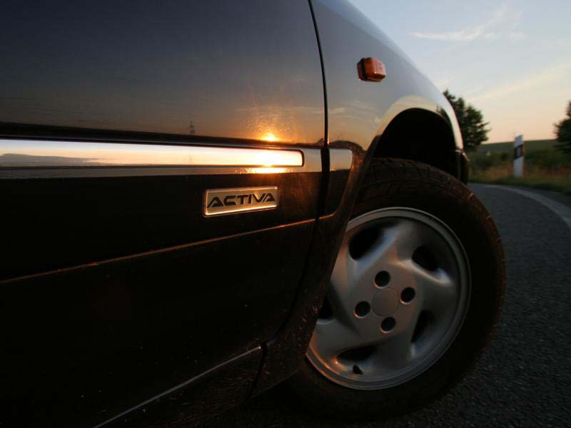 Citroen Xantia Activa mit Logo